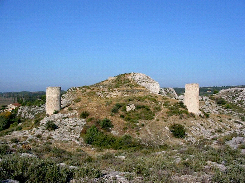 43°42′20″N 4°47′32.1″E / 43.70556°N 4.79225°E